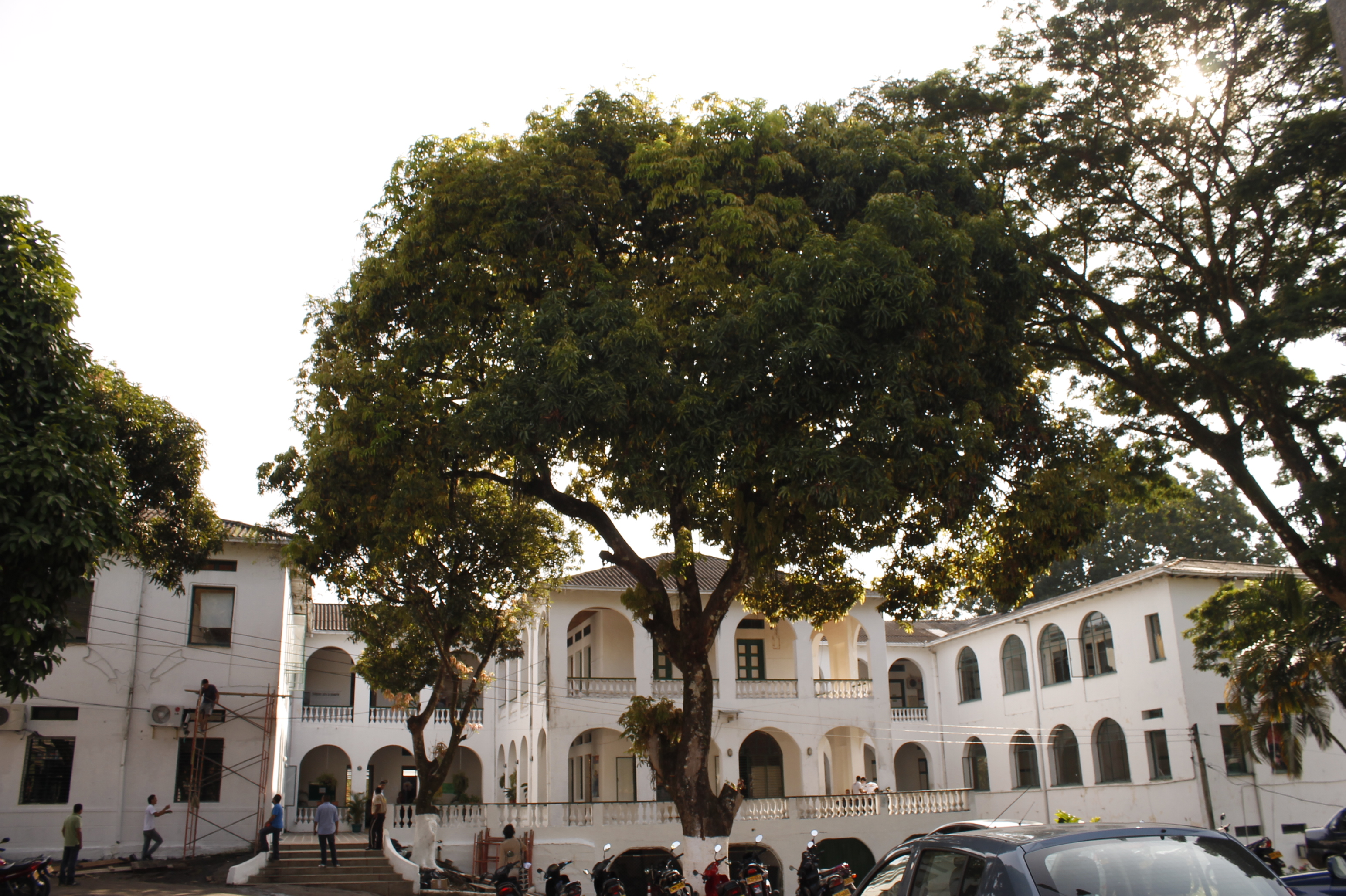 Una perspectiva del edificio Curiplaya, actual Palacio de la Cultura y de Bellas Artes, Florencia, Caquetá, Colombia.